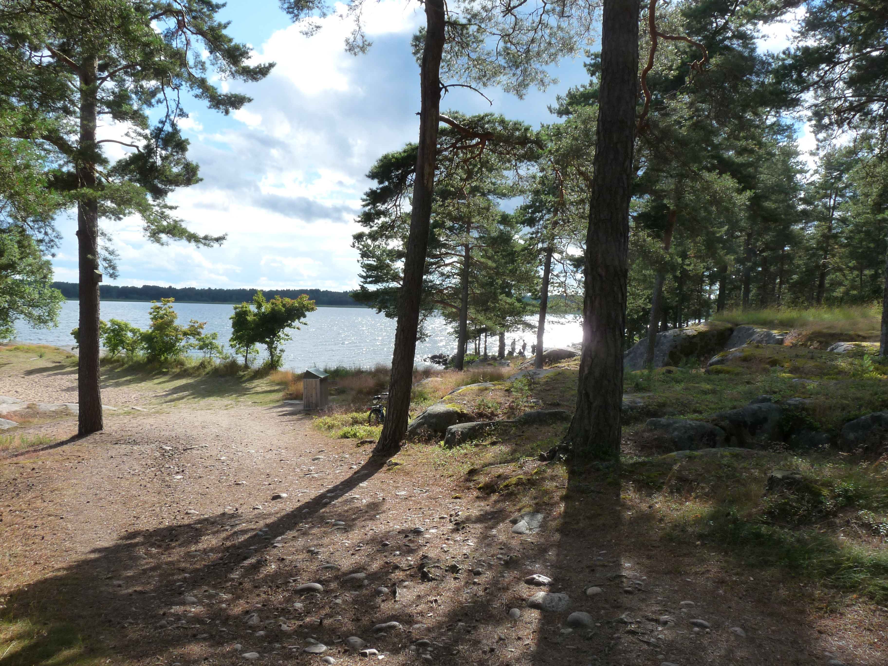 De kust bij het Varna meer in Skutberget bij Karlstad